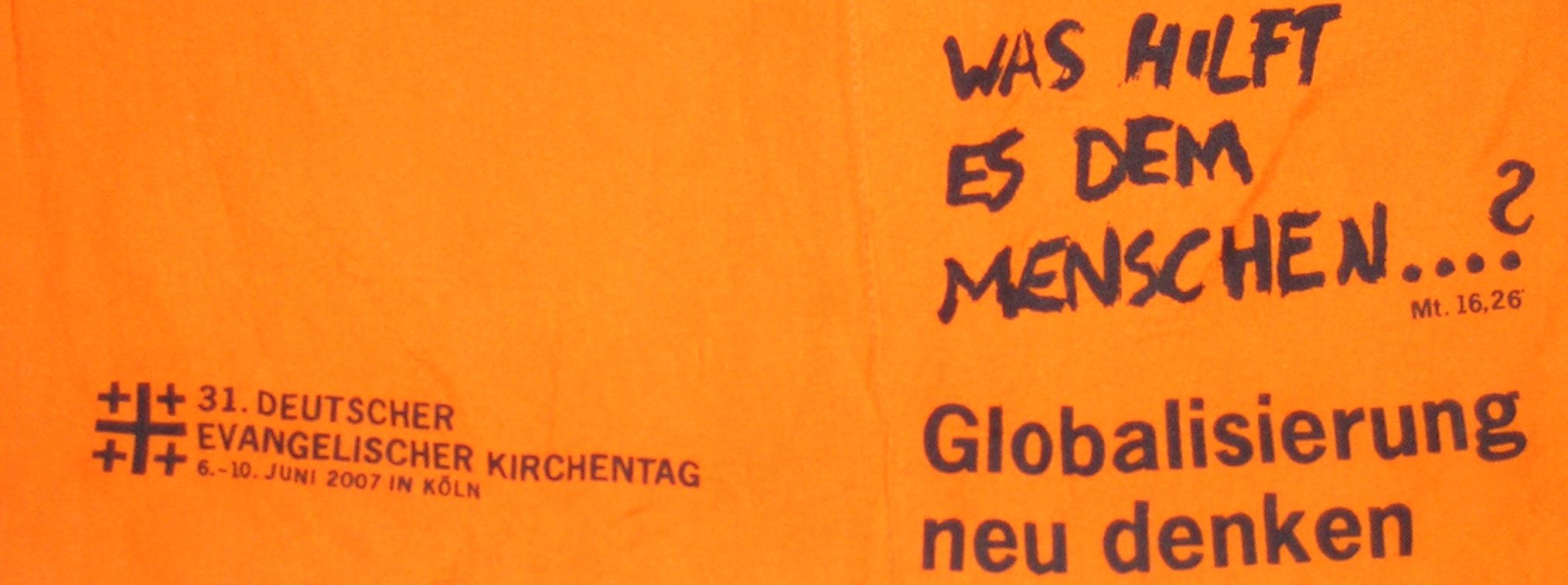 Das orangefarbene Halstuch des Deutschen Evangelischen Kirchentag 2007, ein Produkt aus fairem Handel, Made in India, war während des Kirchentages gegen eine Mindestspende von 2 EUR an mehreren Ständen erhältlich.